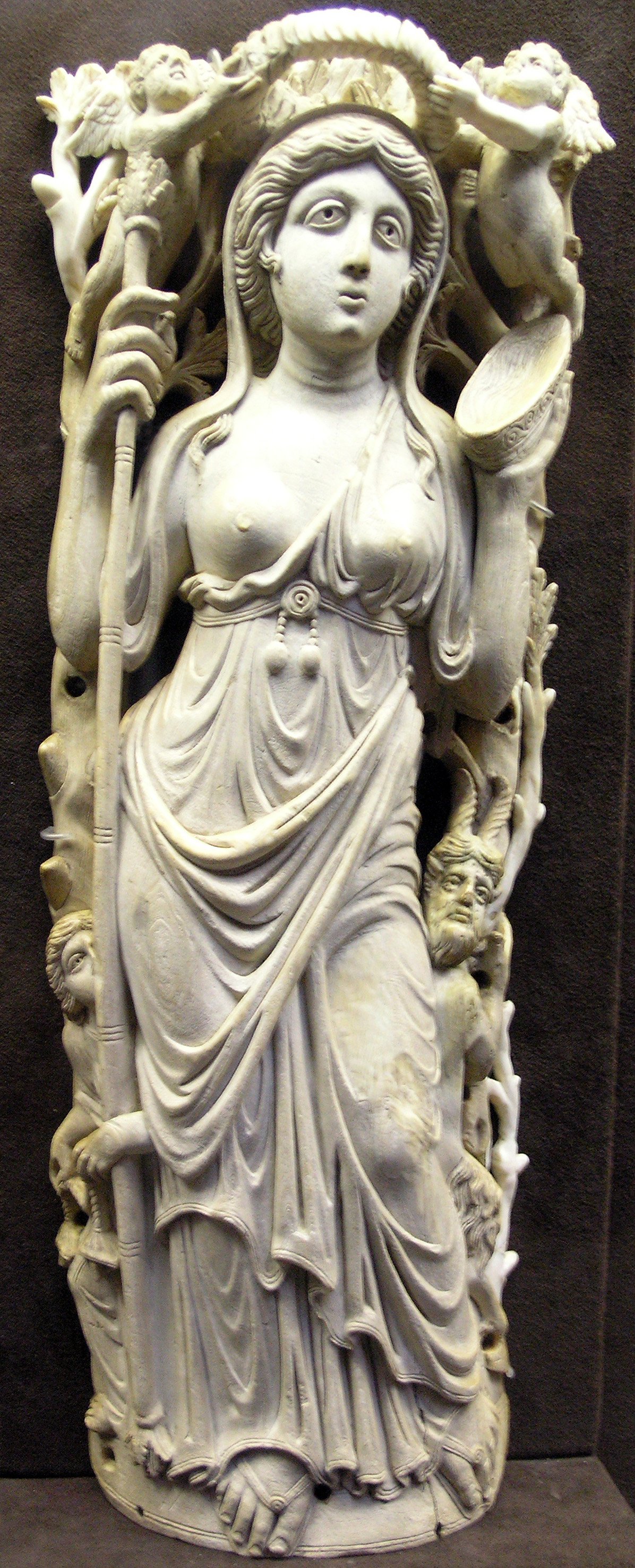 Groupe d'applique représentant Ariane, un satyre, une ménade et des amours